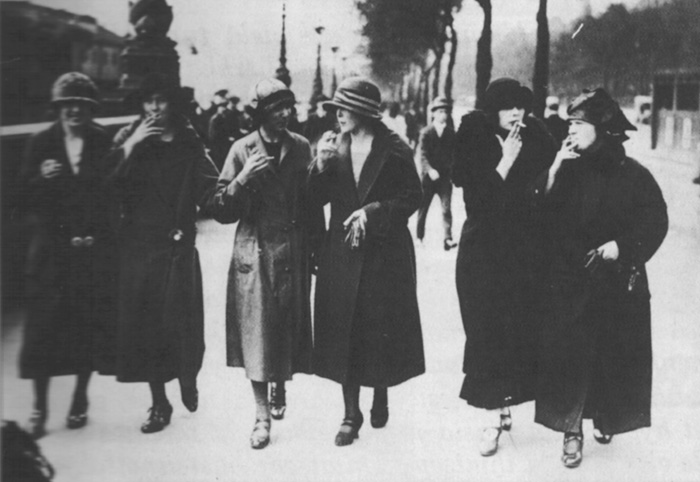 Smoking women